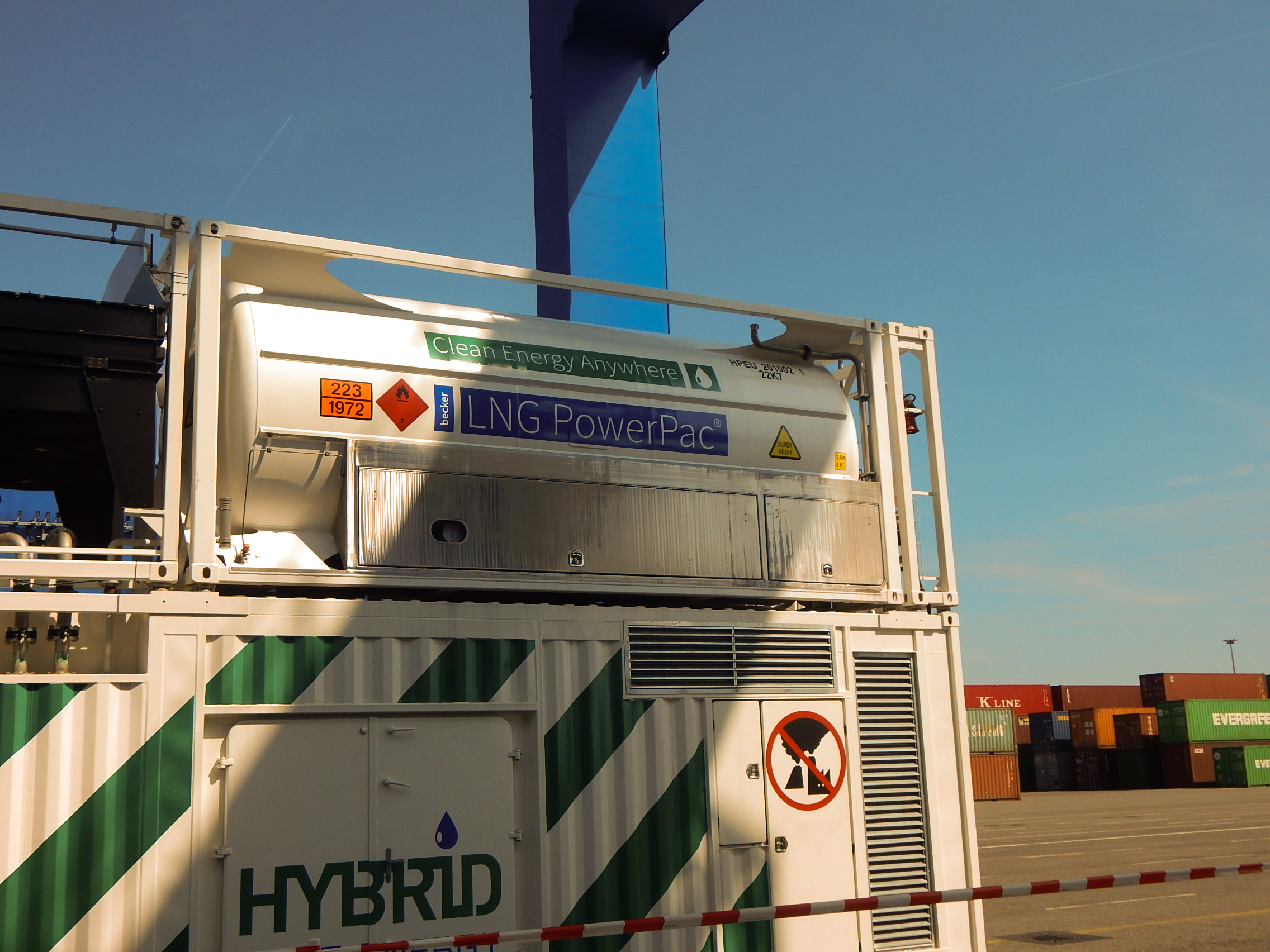 HHLA Presseinfo 2018-08-22 LNG Stromversorgung